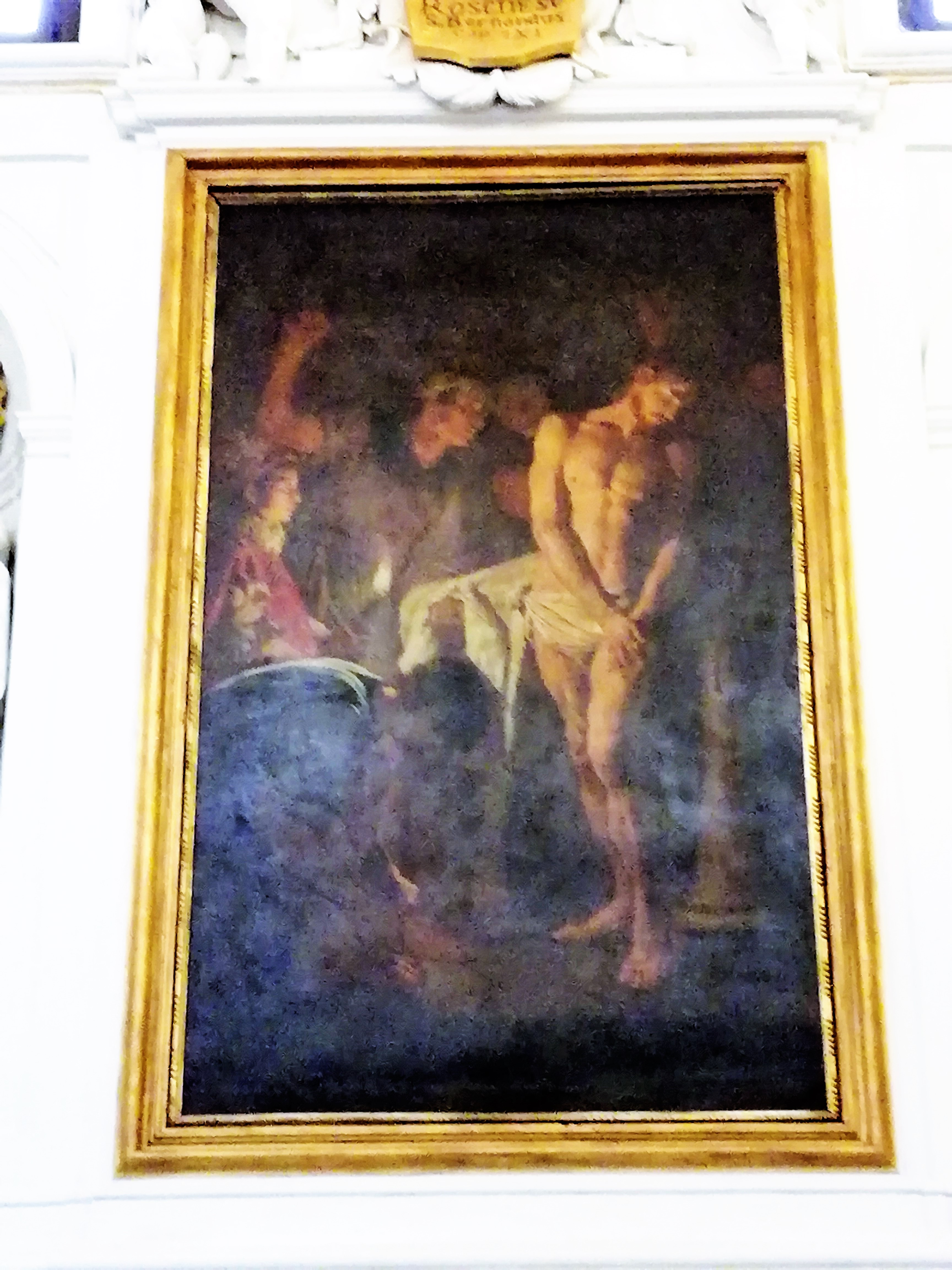 Dipinto